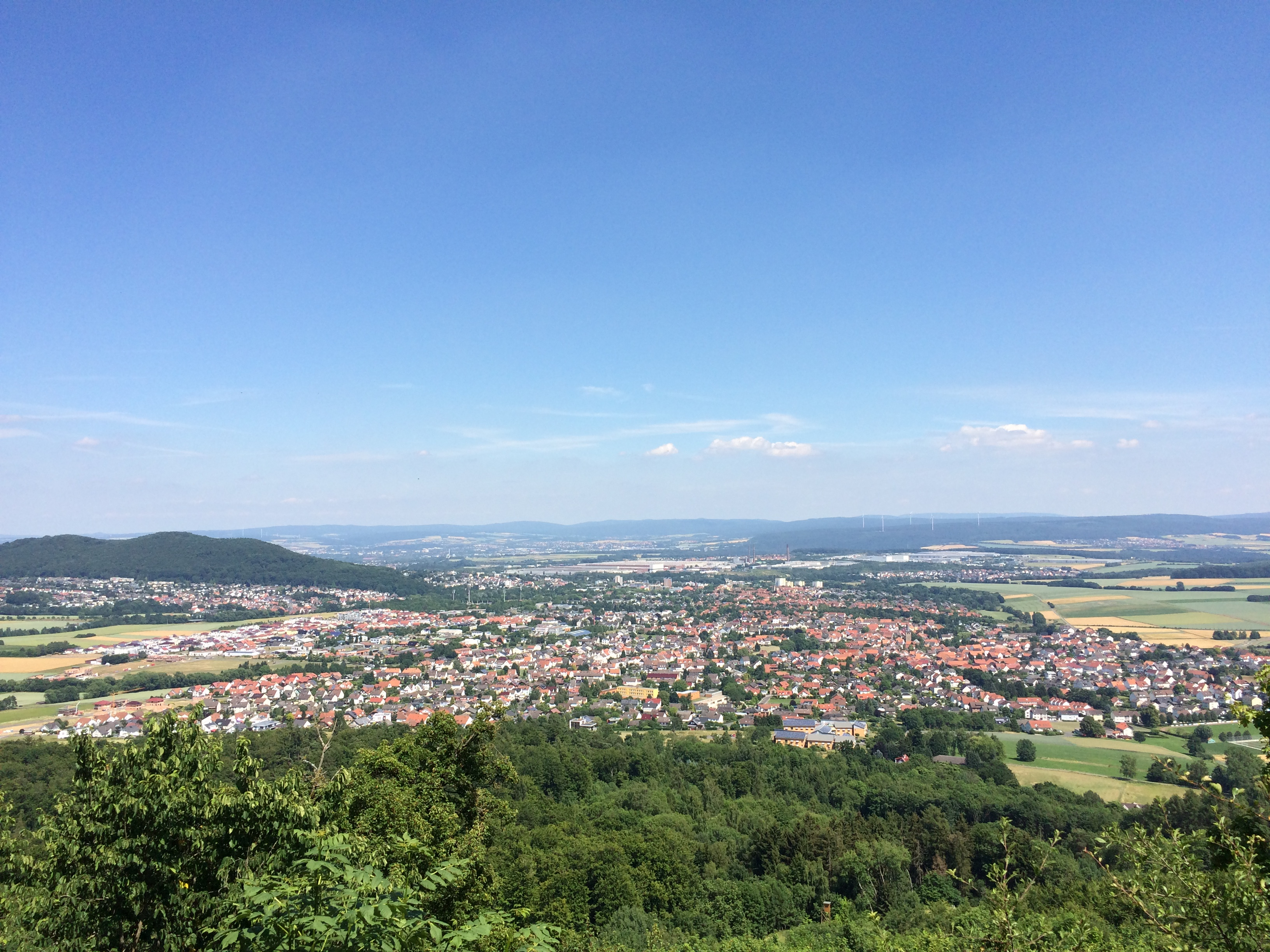 Ostblick vom Burgberg westlich von Baunatal-Großenritte über Baunatal